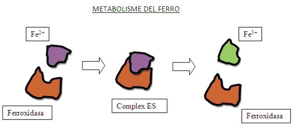 Transformació del ferro II (Fe2+) en ió fèrric (Fe3+) per l'acció de la ferroxidasa.